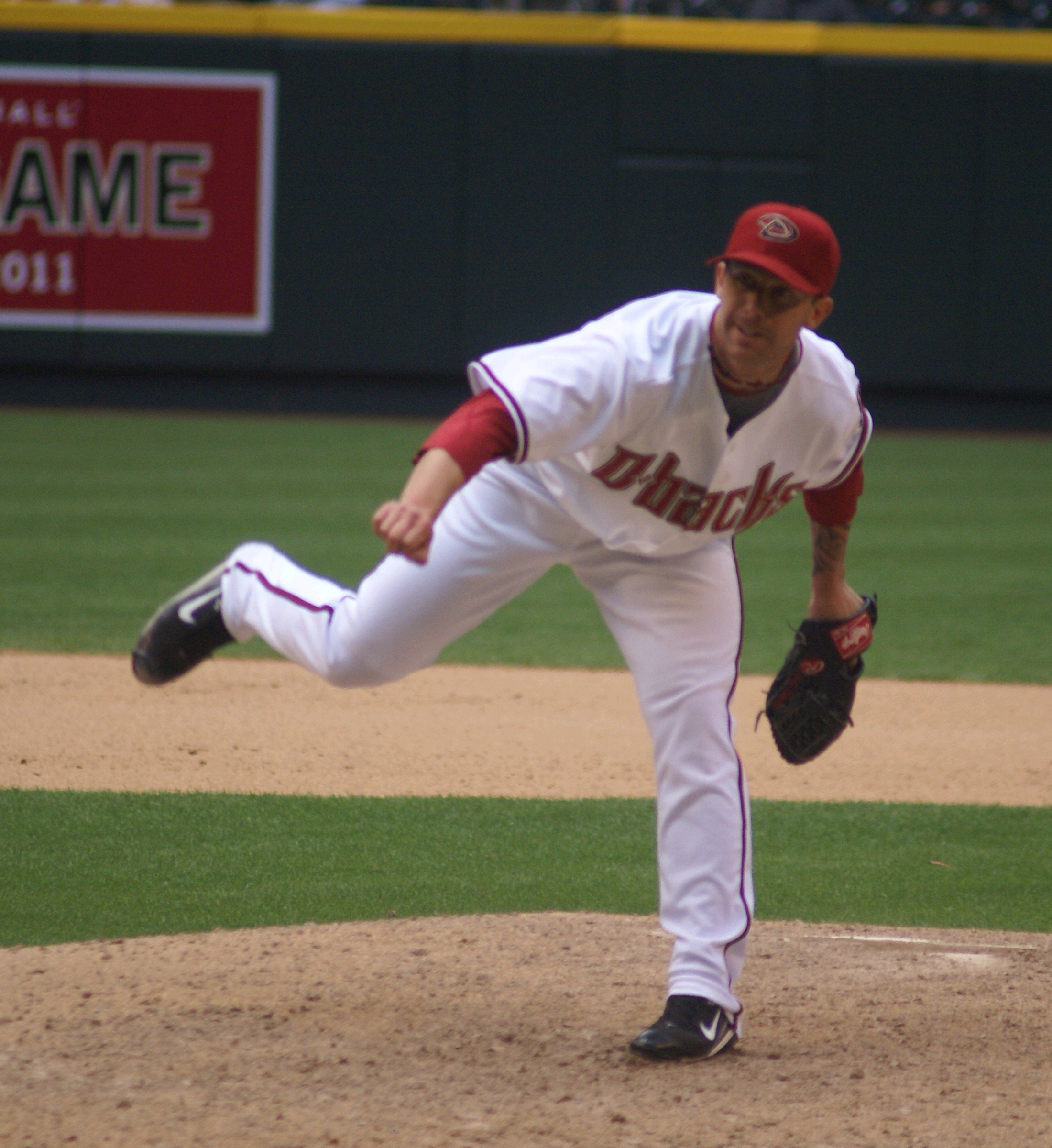 Bobby Korecky